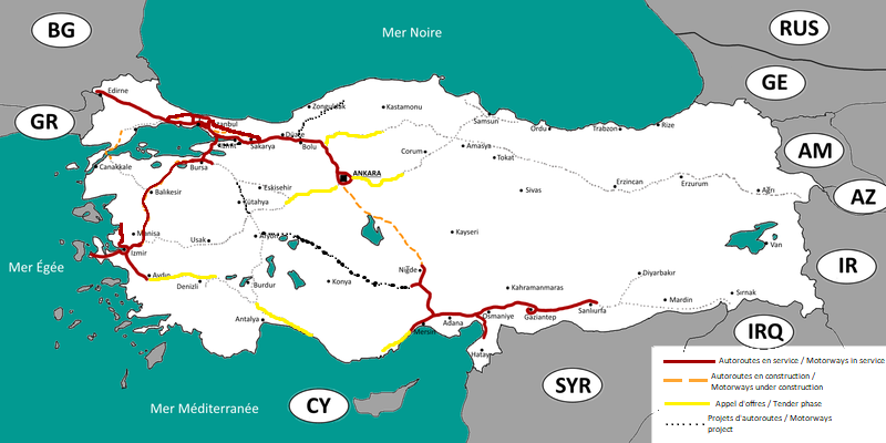 Carte des autoroutes en Turquie / Motorways in Turkey